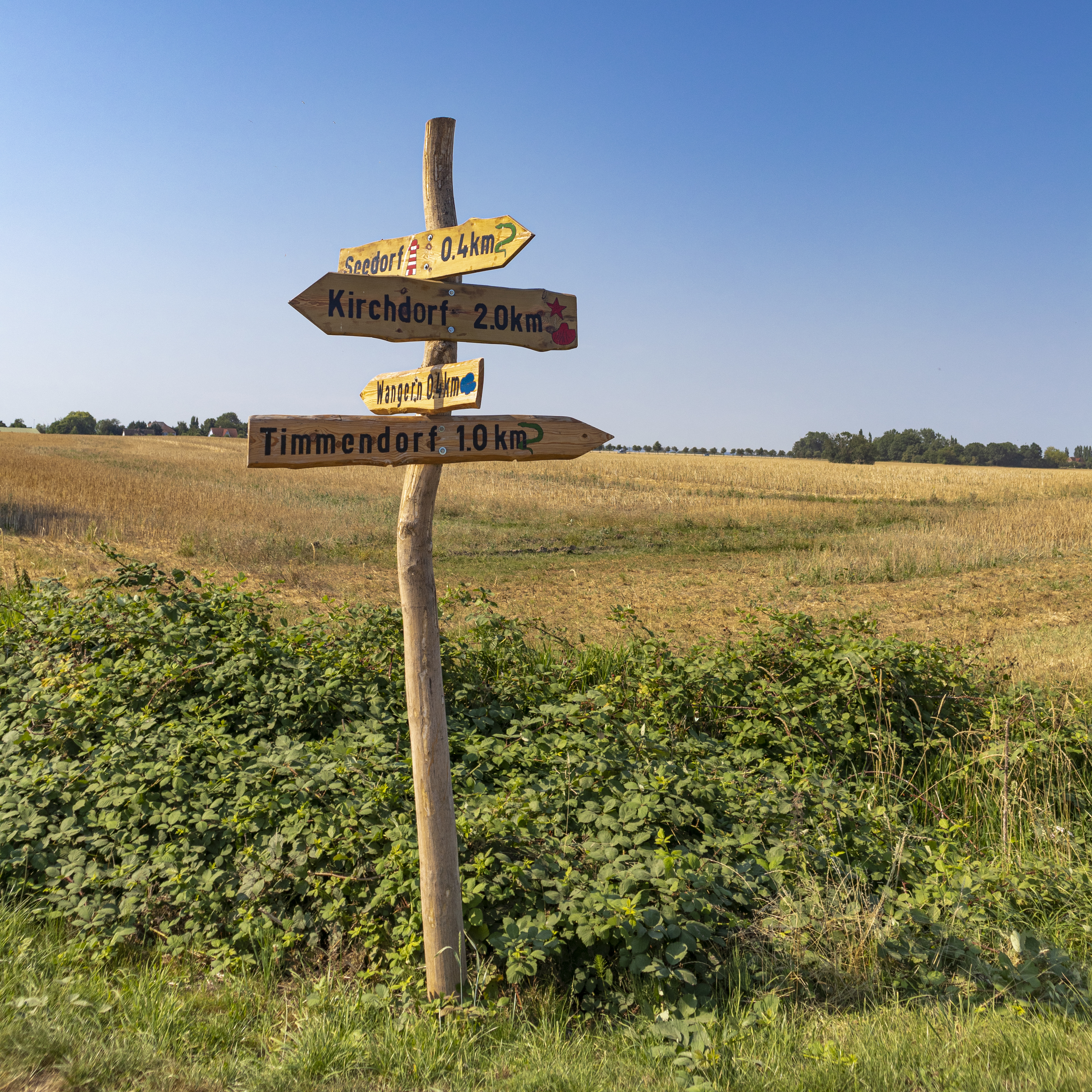 Insel Poel